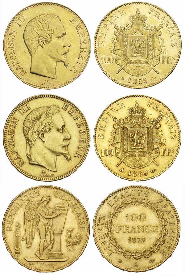 Pièces françaises de 100 francs or : 1) Napoléon III (tête nue) 2) Napoléon III (tête laurée) 3) Génie Debout